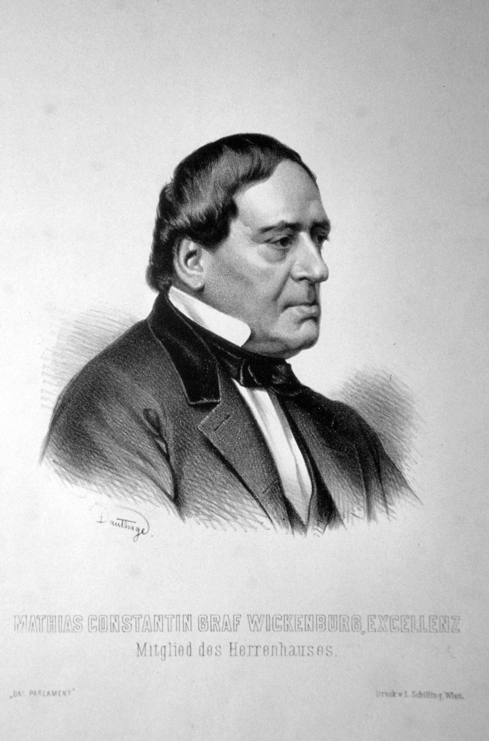 Matthias Constantin Capello Graf von Wickenburg (1794-1880) Gouverneur der Steiermark, Minister, Lithographie von Adolf Dauthage um 1860